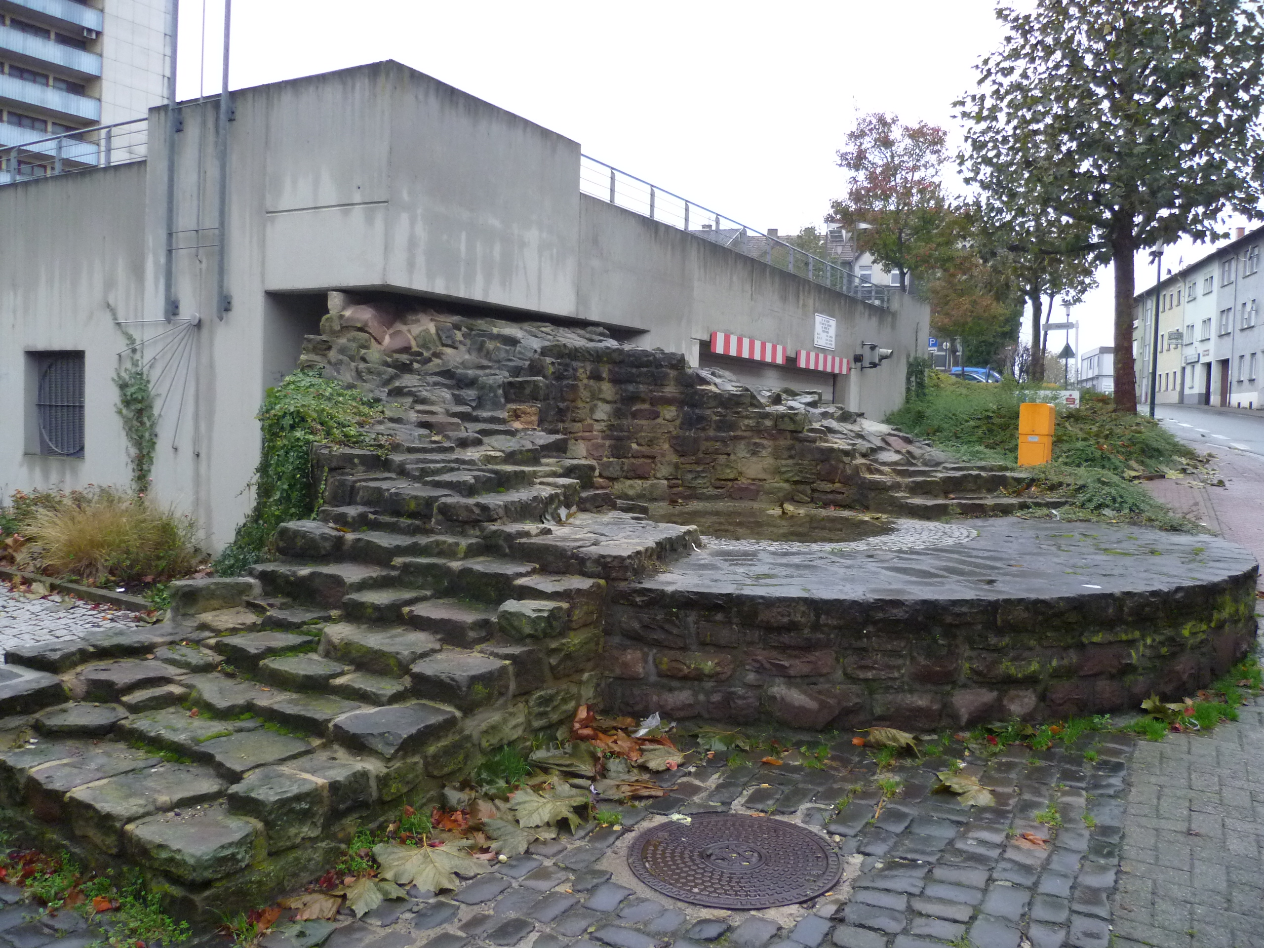 Süd-West-Eckturm des Renaissance-Schlosses (Reste), Turm in Neunkirchen (Saar)